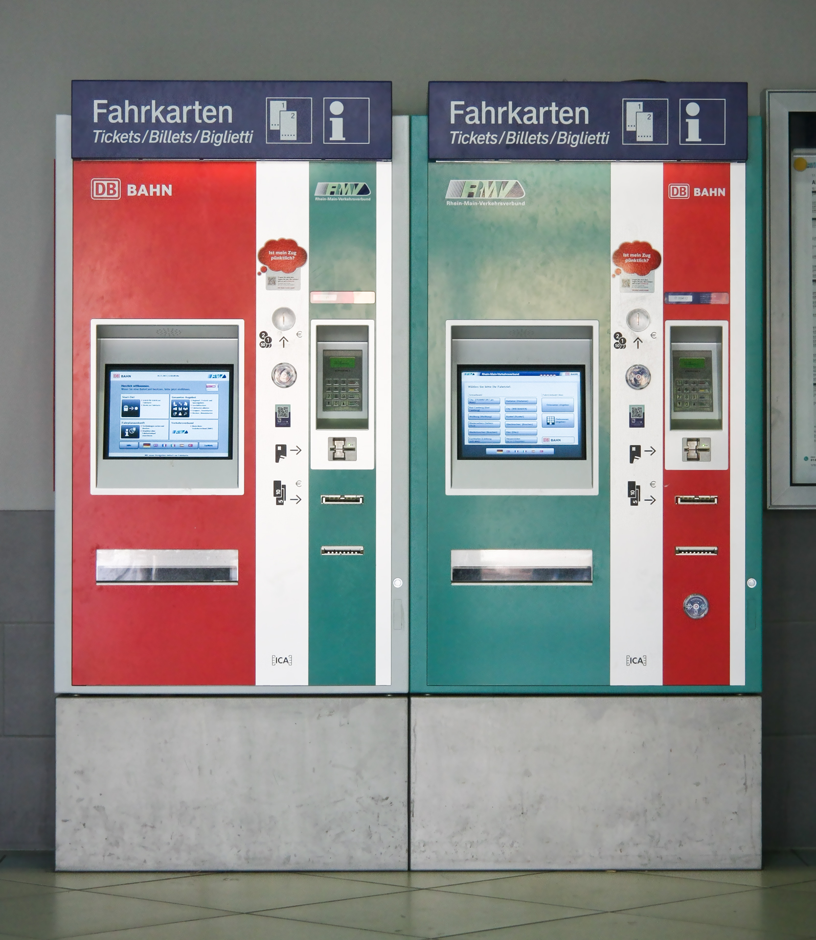 Fahrkartenautomaten der Deutschen Bahn und des Rhein-Main Verkehrsverbund im Bahnhof Limburg an der Lahn